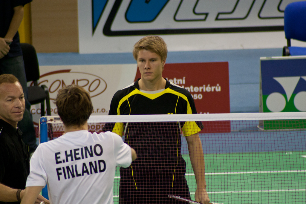 Mezinárodní mistrovství ČR v badmintonu